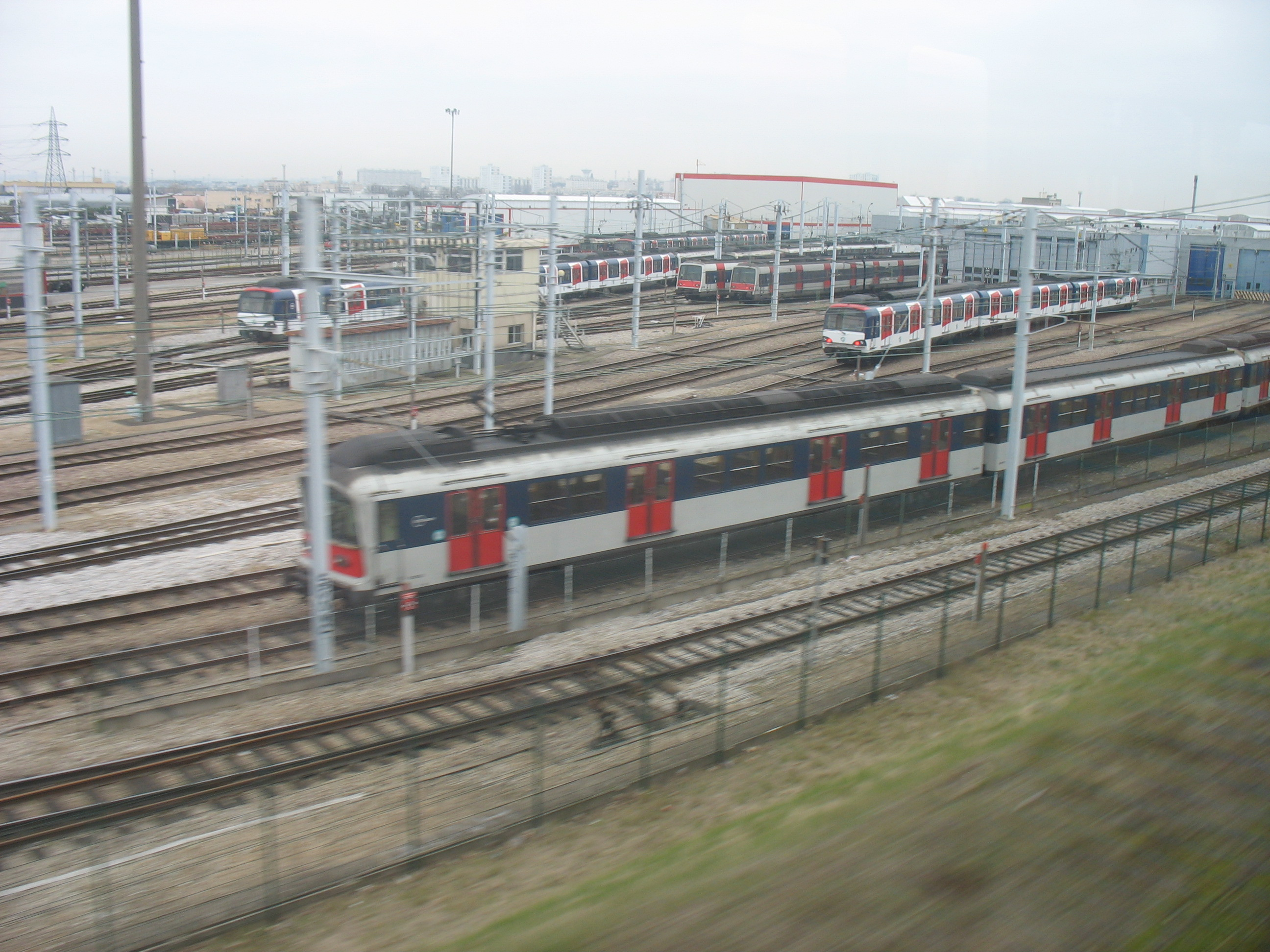 Autre vue de l'atelier de maintenance de Sucy, on voit sur cette photo les MS 61 non-rénovés et rénovés depuis la voie RER A